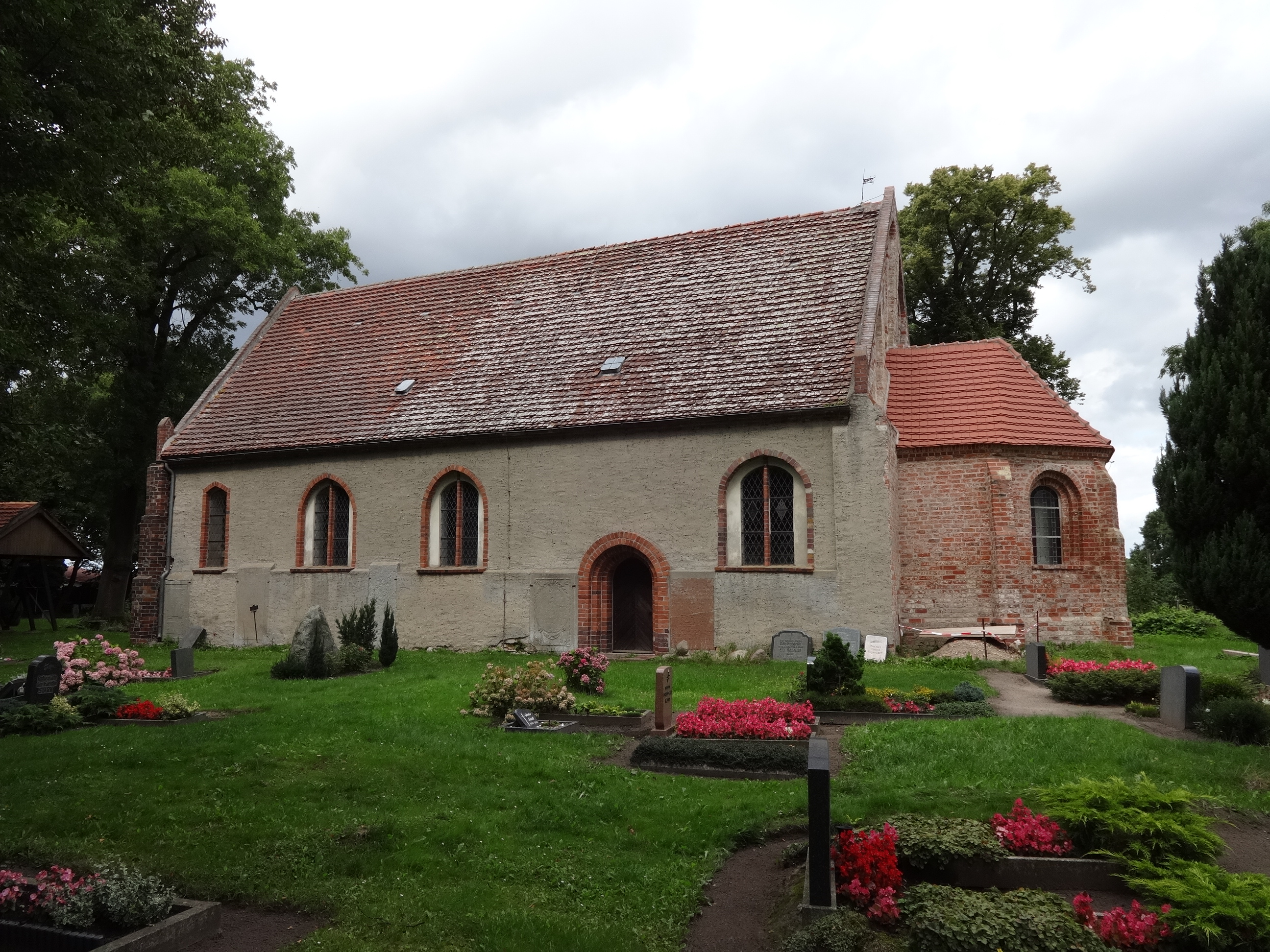 Dorfkirche in Rubkow aus der zweiten Hälfte des 14. Jahrhunderts mit Reliefs der Evangelisten aus dem 17. Jahrhundert und Kabinettscheiben der Familien Below und Quistorp; auf dem Friedhof ein Mausoleum aus dem Jahr 1877 für August von Quistorp und seine Frau Emilie.